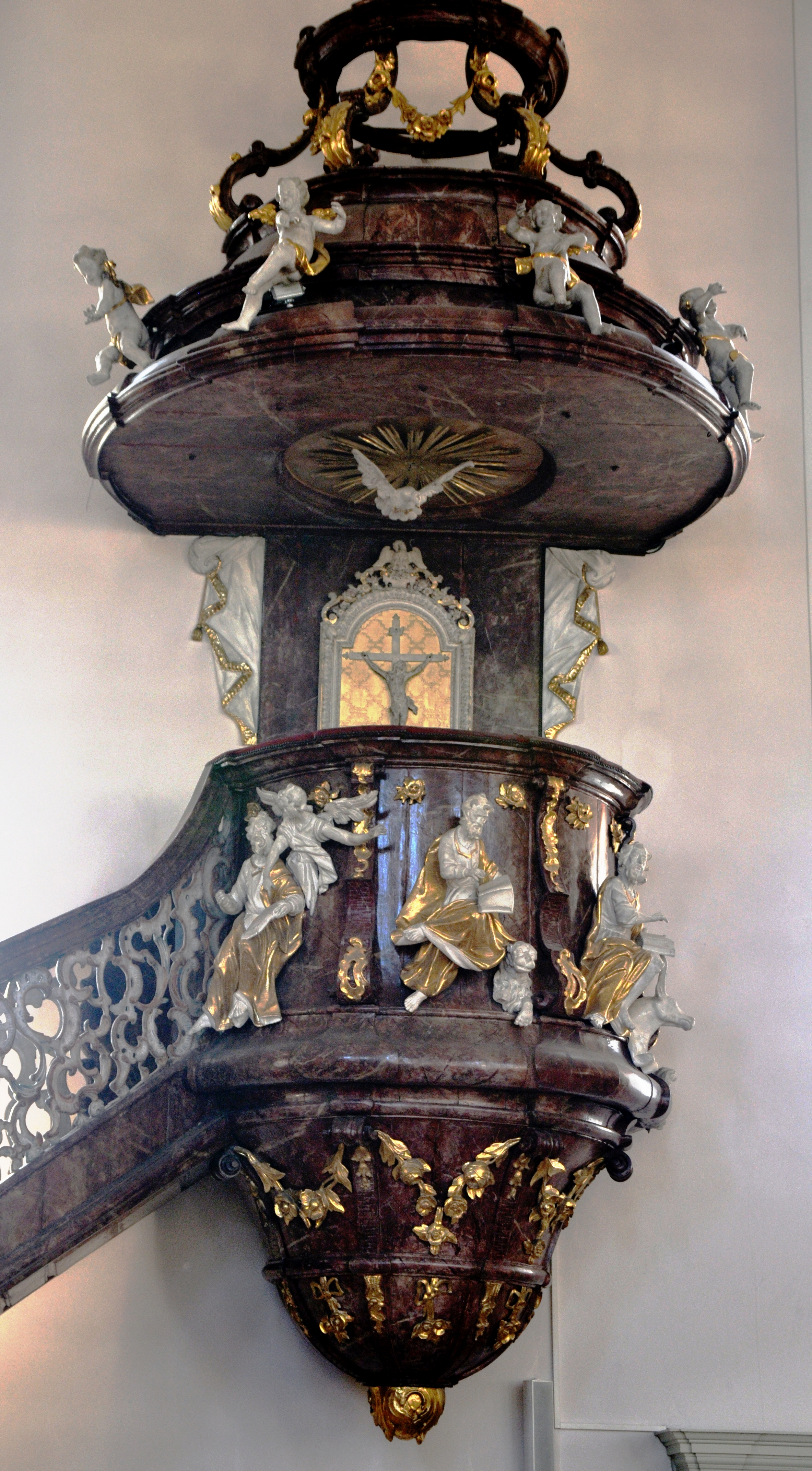 Rokoko-Kanzel (um 1725), Kath. Pfarrkirche St. Maria Himmelfahrt Herxheim